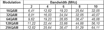 DVBC rychlosti